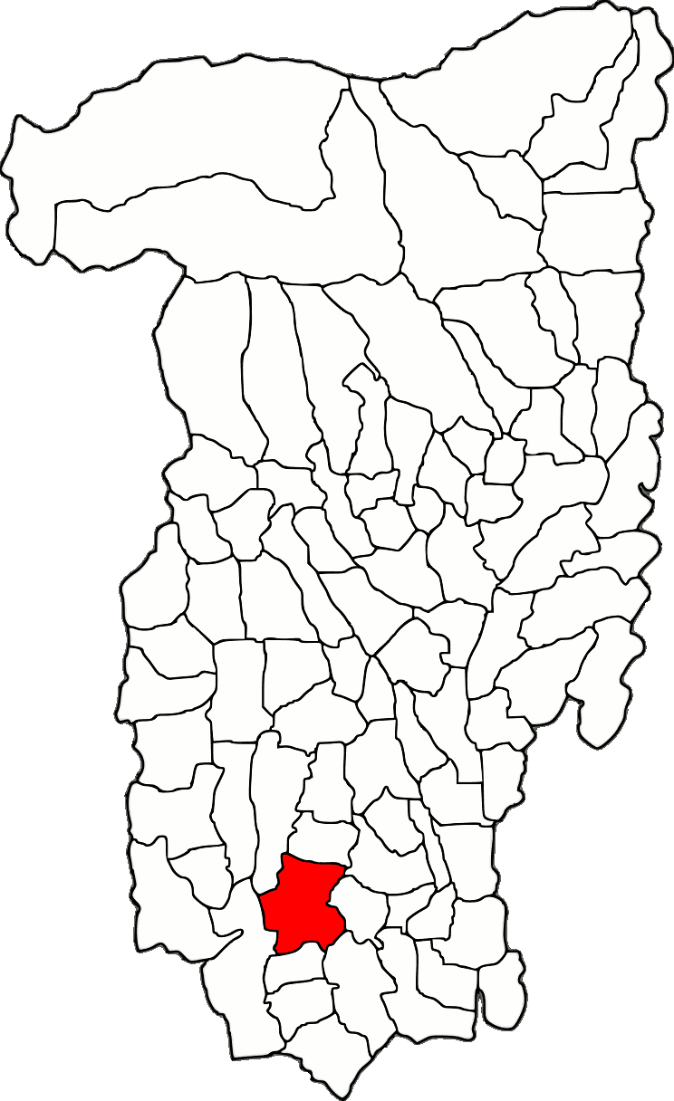 Lage der Gemeinde Valea Mare im Kreis Vâlcea (RO).